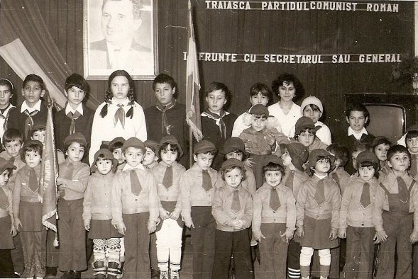 Members of Şoimii Patriei (Romania)